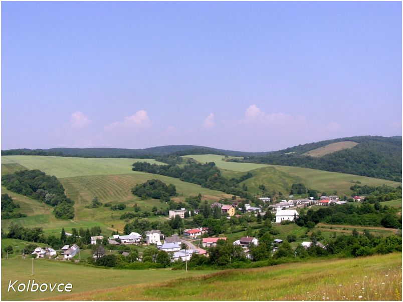 Celkový pohľad